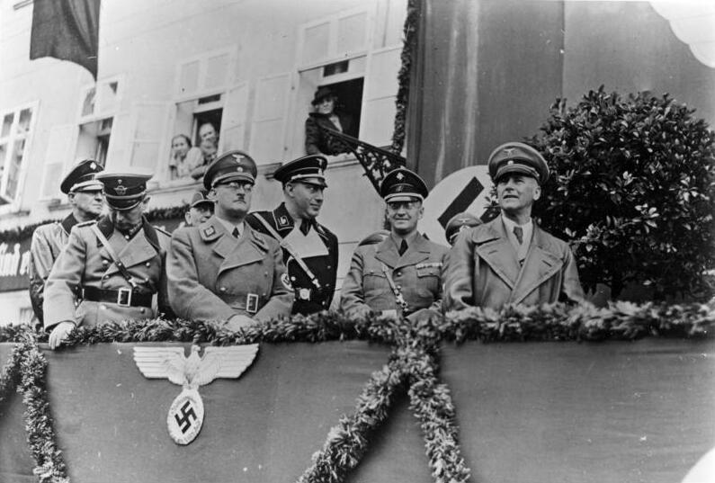 Staatsbesuch des Reichs und Preußischen Ministers des Innern Dr. Wilhelm Frick in Sudetenland